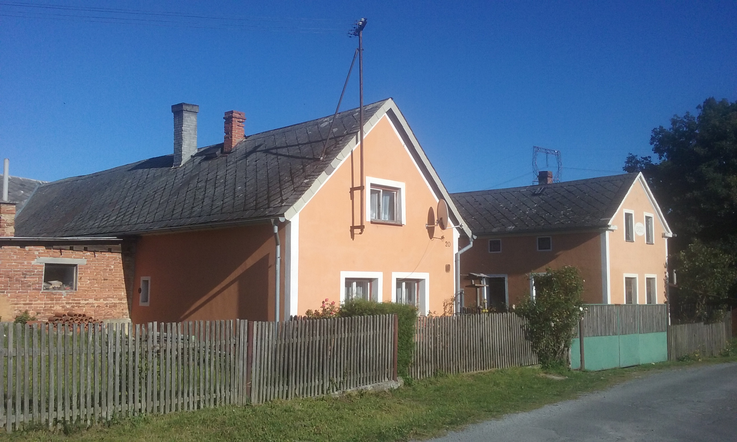 Domy v Chudči. Okres Plzeň-sever, Česká republika.